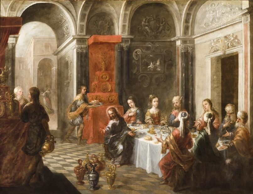 La obra representa las Bodas de Caná, durante las que Jesucristo, a instancias de su madre, la Virgen María, realizó el primero de los milagros de su vida pública.